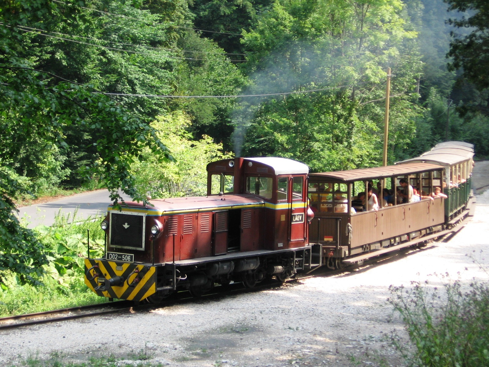 LÁEV-szerelvény halad Garadna felé. A vonat egy Mk48-as mozdonyból, egy nagy MÁV-kocsiból és 3-4 Diamond kocsiból áll